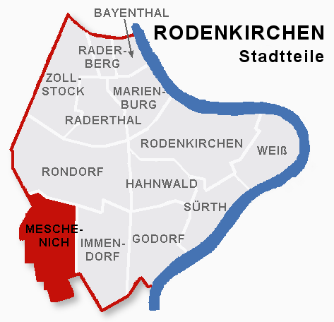 Lage des Stadtteils Meschenich im Stadtbezik Rodenkirchen